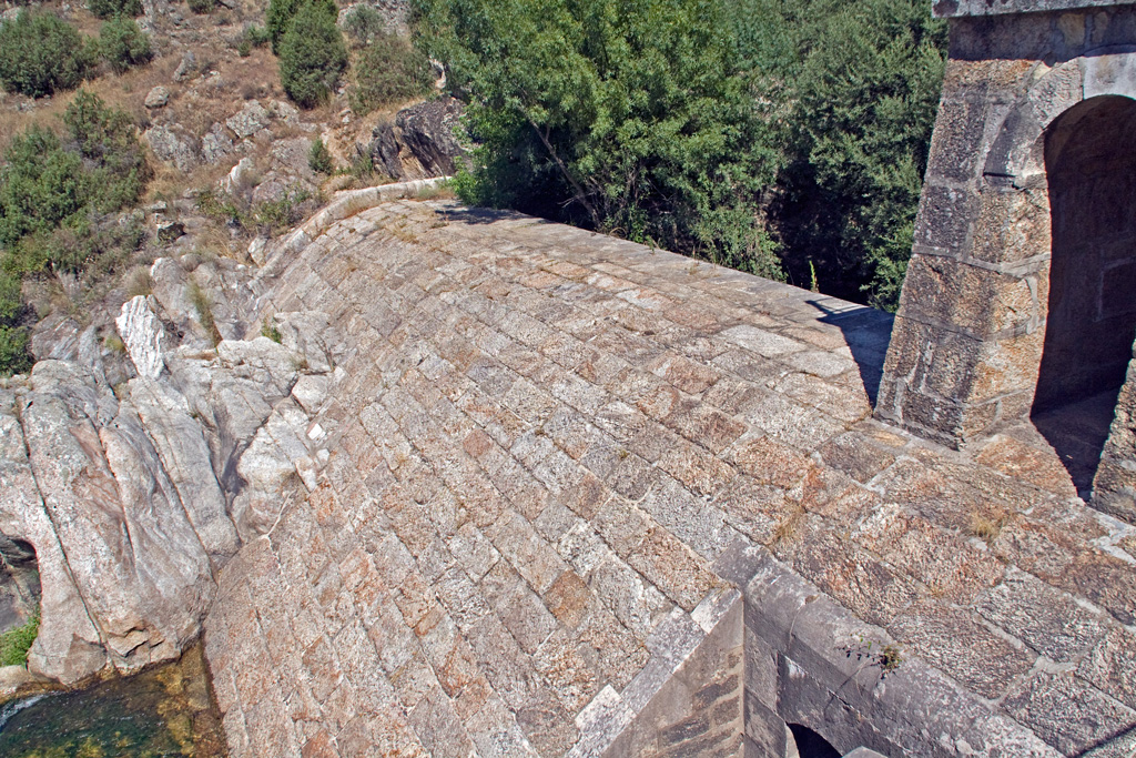 Azud de El Mesto. Origen del canal del Guadalix.